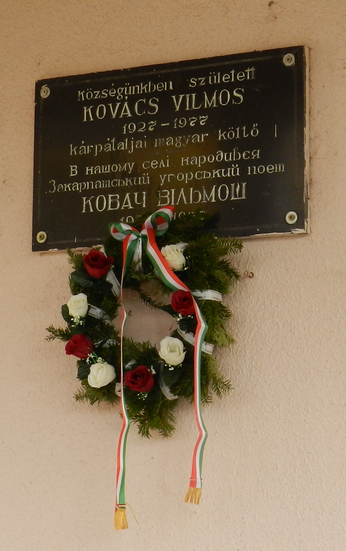 Меморіальна дошка з нагоди 80-річчя із Дня народження Вільмоша Ковача (1927-1977)